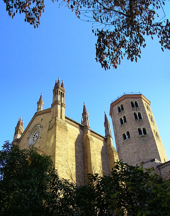 La chiesa di Sant'Antonino a Piacenza. Picture taken by user:Idéfix, February 2005.